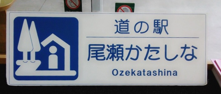 道の駅 尾瀬かたしなで撮影。